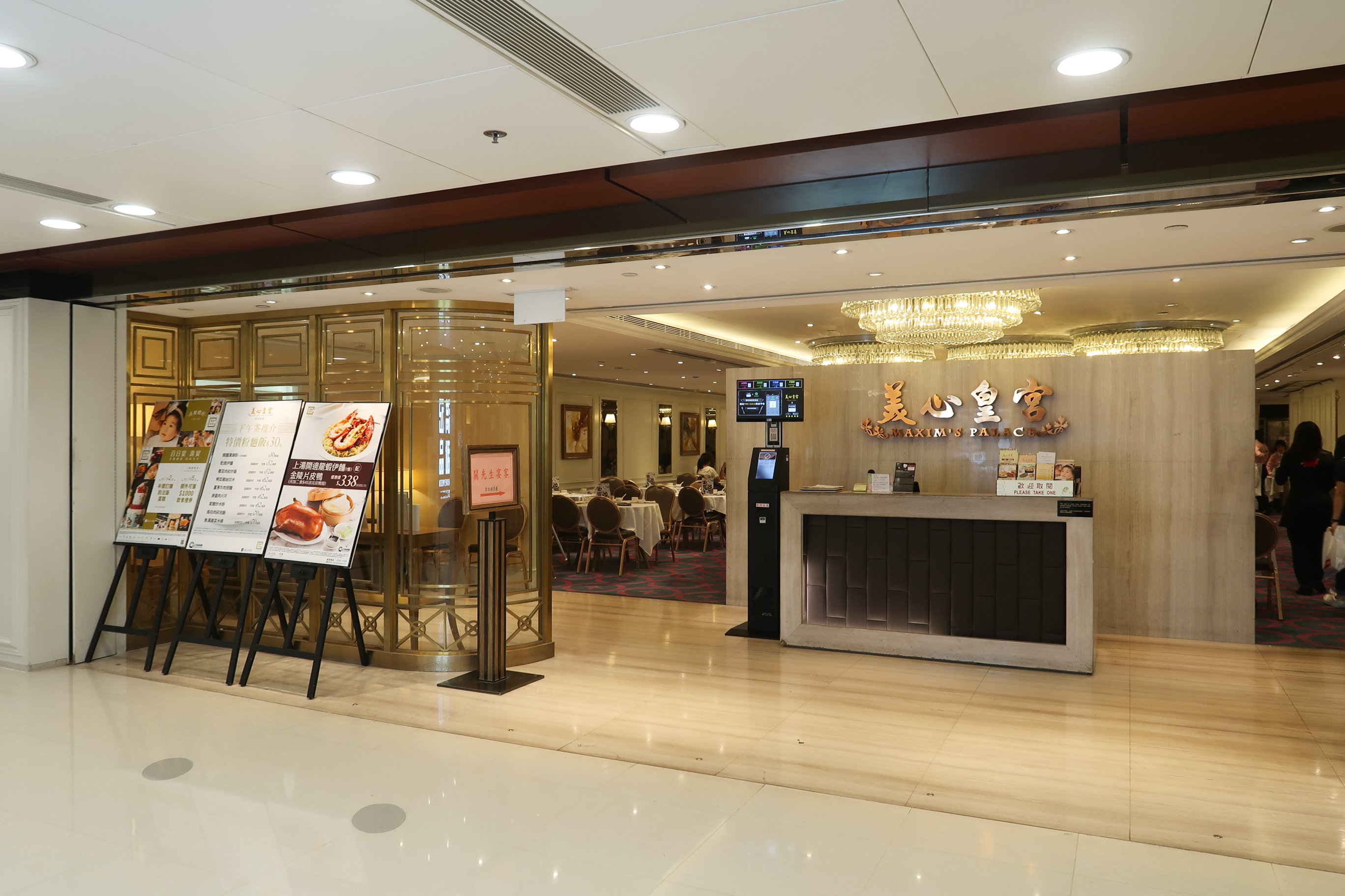 Telford Plaza Maxim Palace